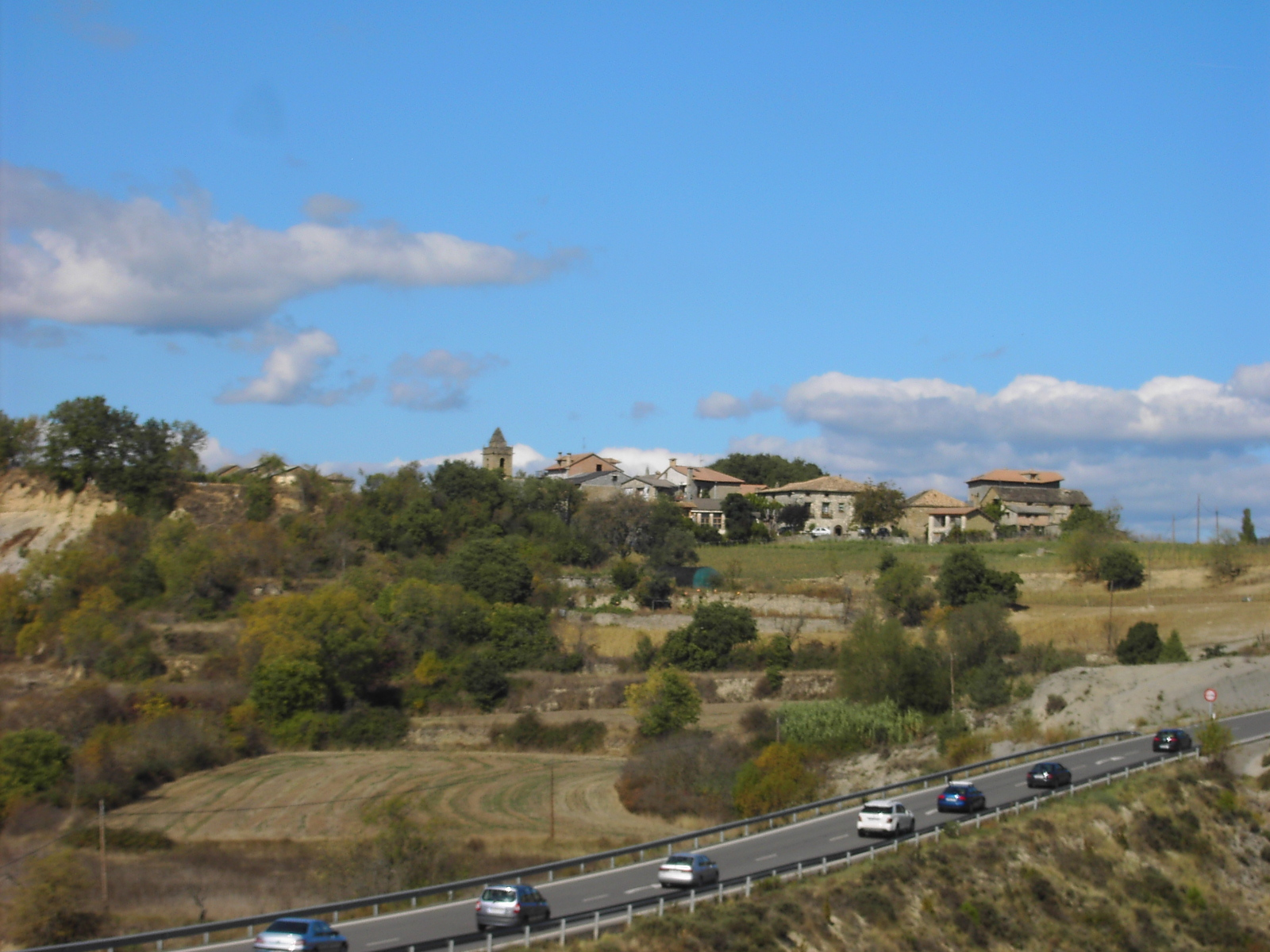 Camporrotuno desde la carretera.